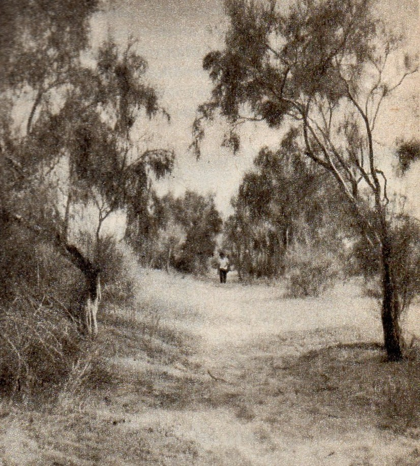 Uroczysko Haloxylon aphyllum w Turkmenistanie na pustyni Kara-kum na płn. od miasta Mary.